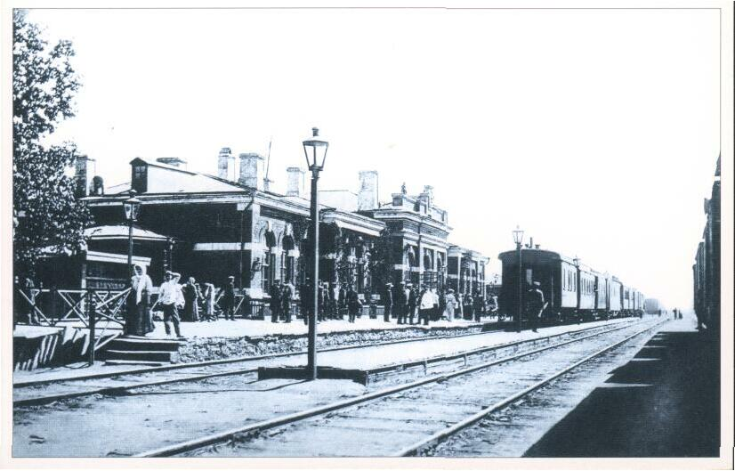 Mariupol old picture